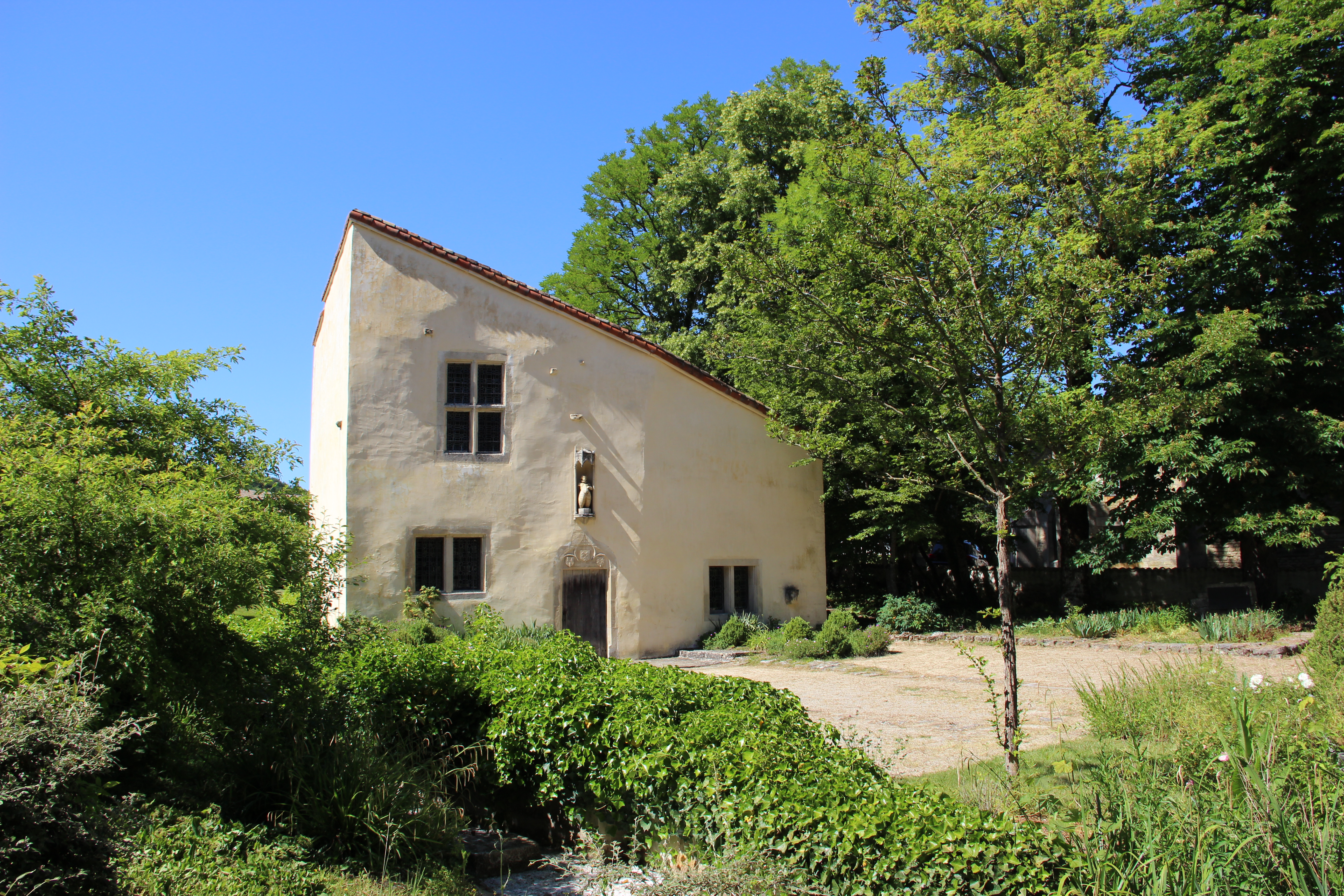 Maison natale de Jeanne d'Arc en juin 2020.